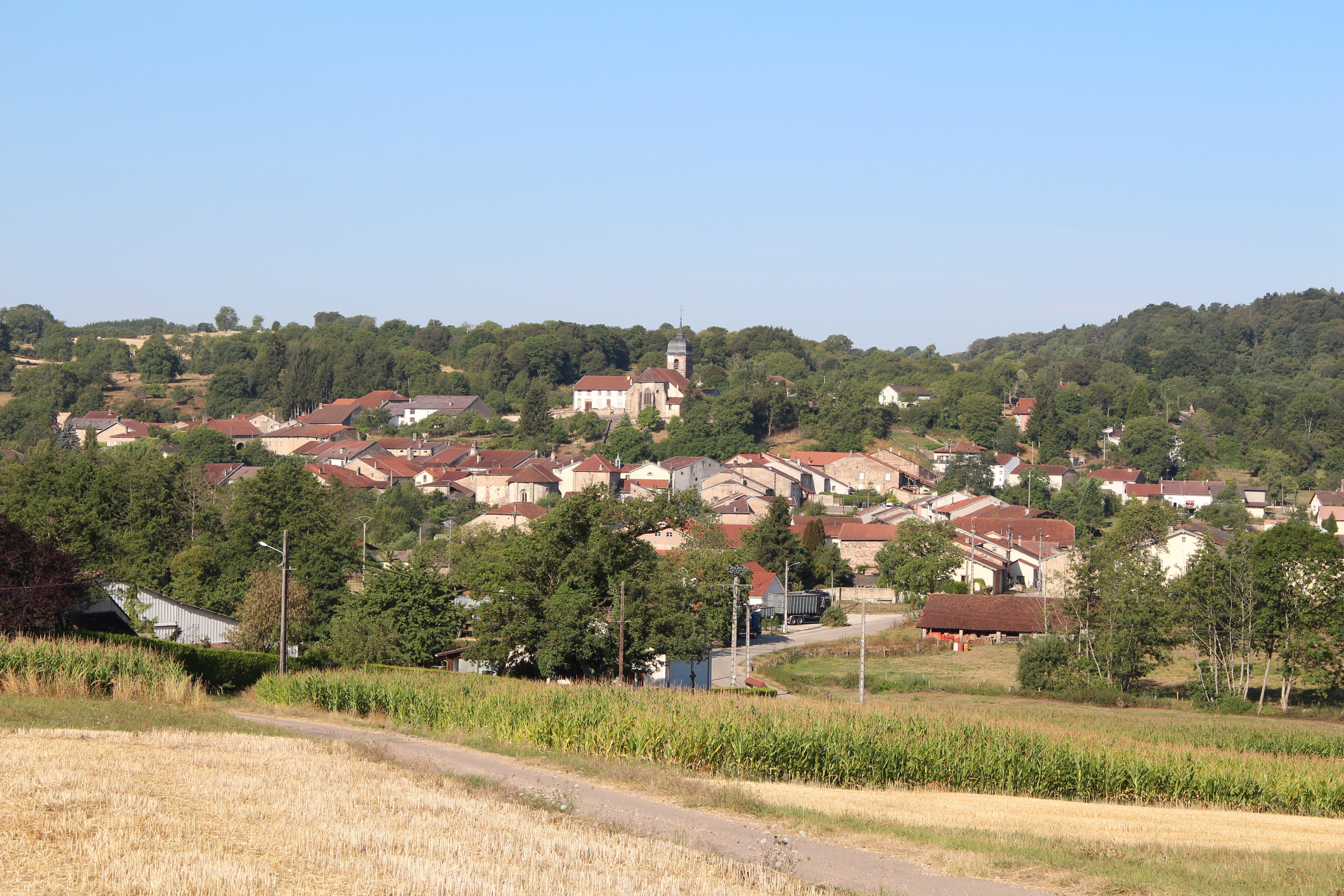 Bleurville, vue générale (août 2015)